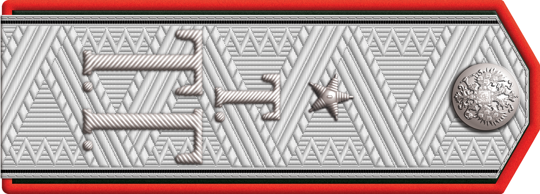 Погон: врач Ташкентского военного госпиталя, статский советник, 1914–1917 гг.